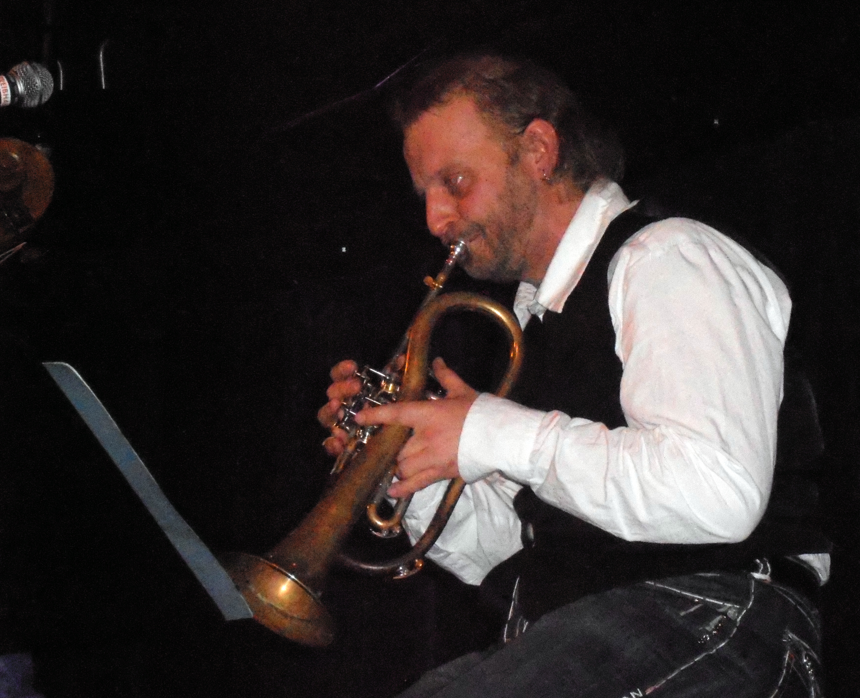 Thomas Gansch (Konzert mit Georg Breinschmid, Treibhaus Innsbruck)